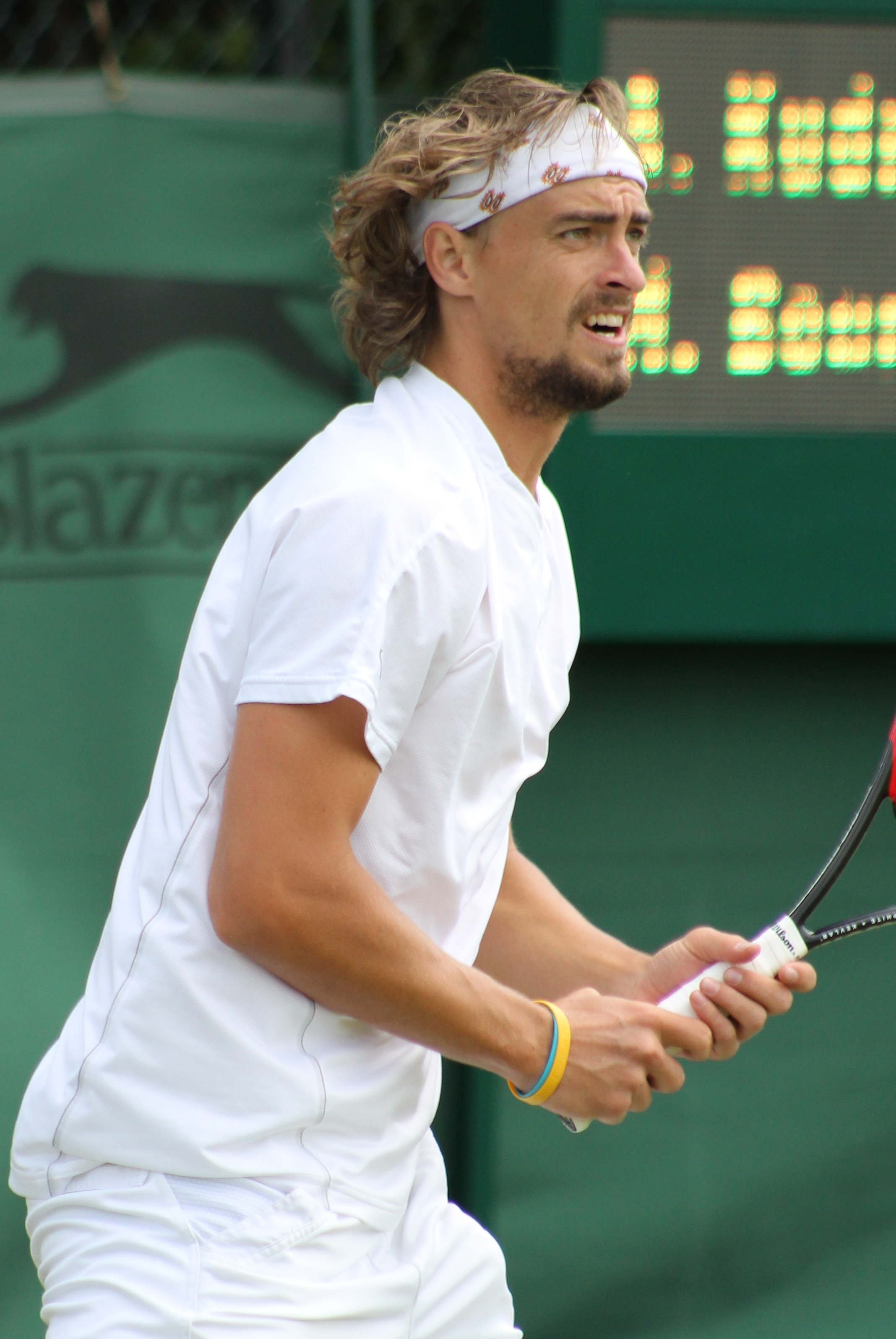 Kudryavtsev WMQ15 (7)